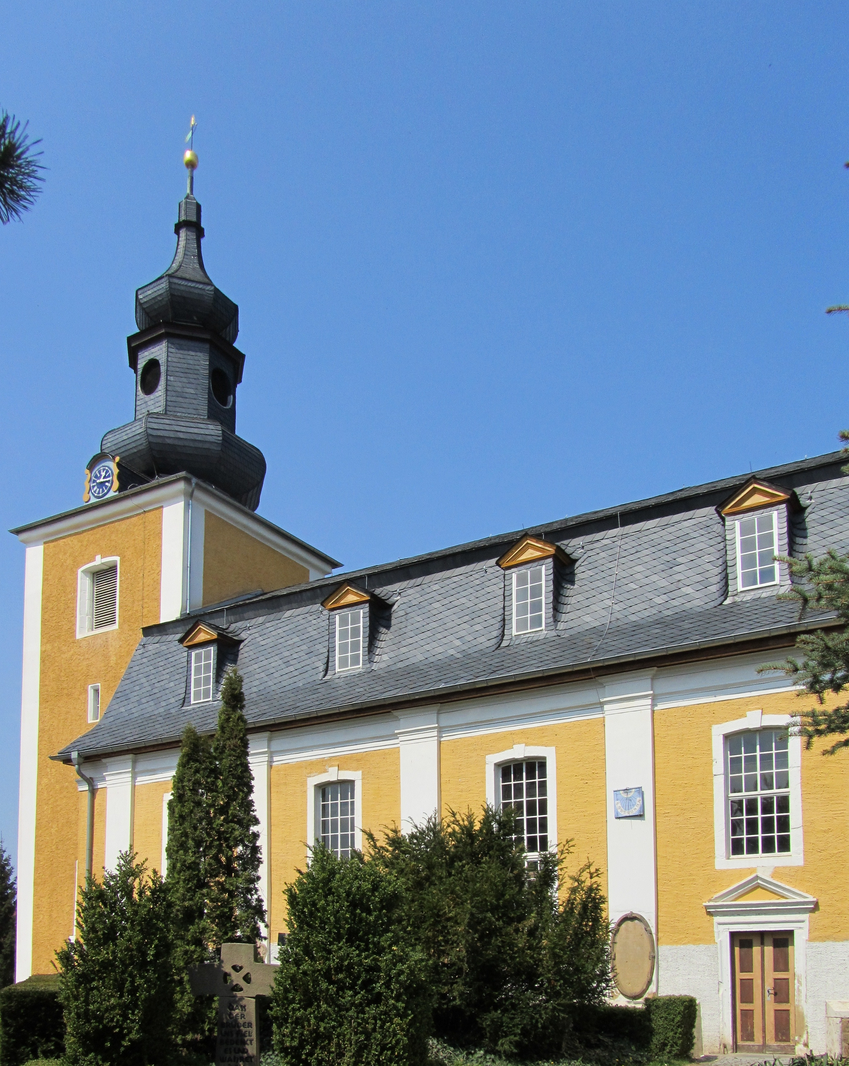 Die Kirche von Großneuhausen (Thüringen).